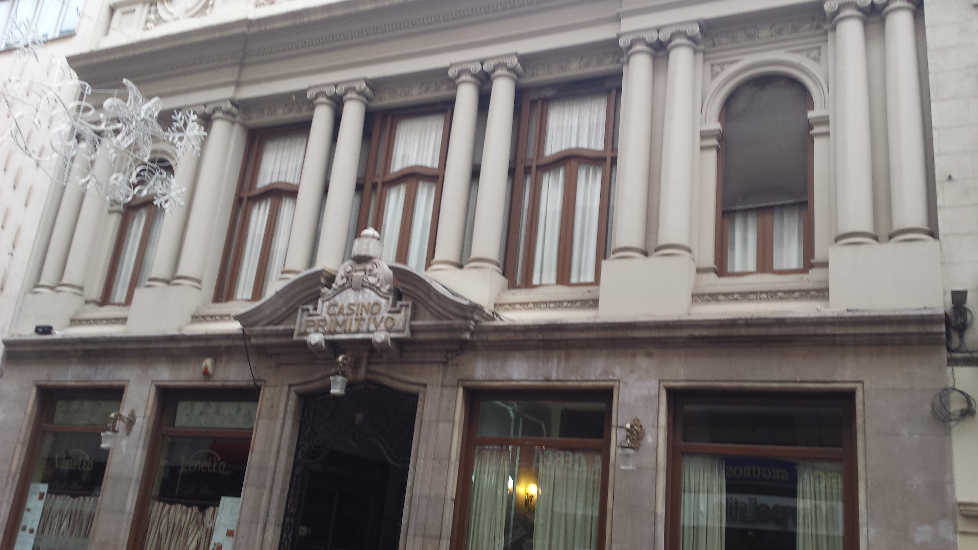 Albacete